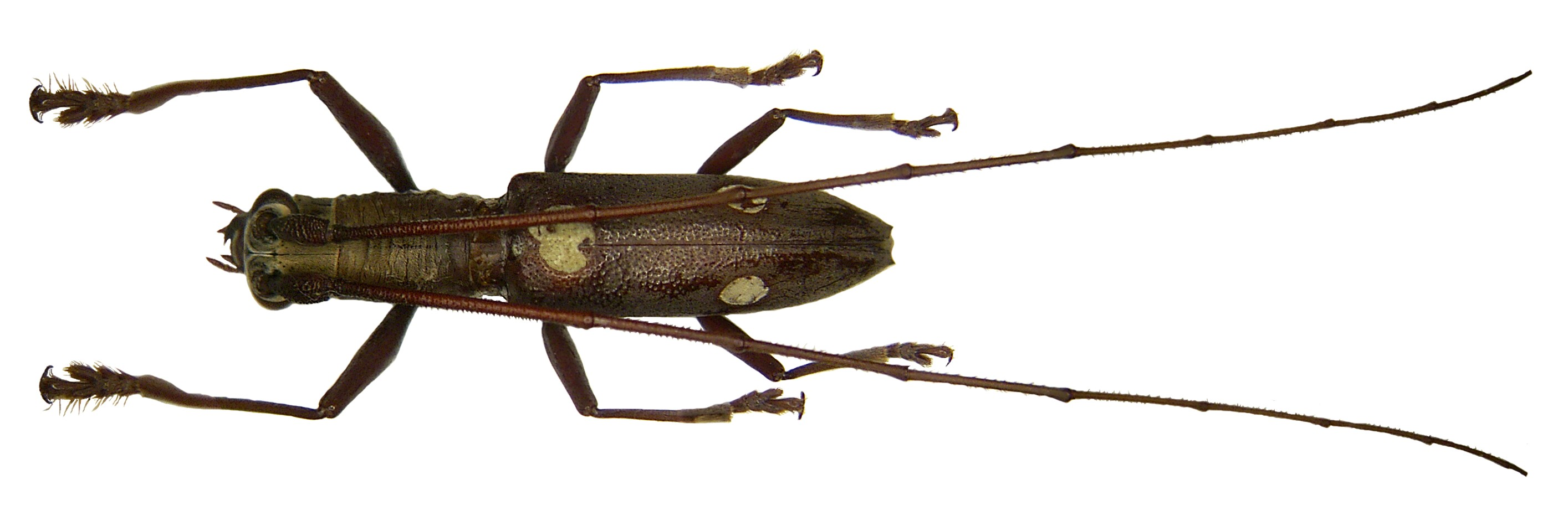 Familie: Cerambycidae Grösse: 18 mm Fundort: Malaysia, Borneo, Sabah leg. W.T.W.Meng, 2000; det. A.Skale Foto: U.Schmidt, 2007